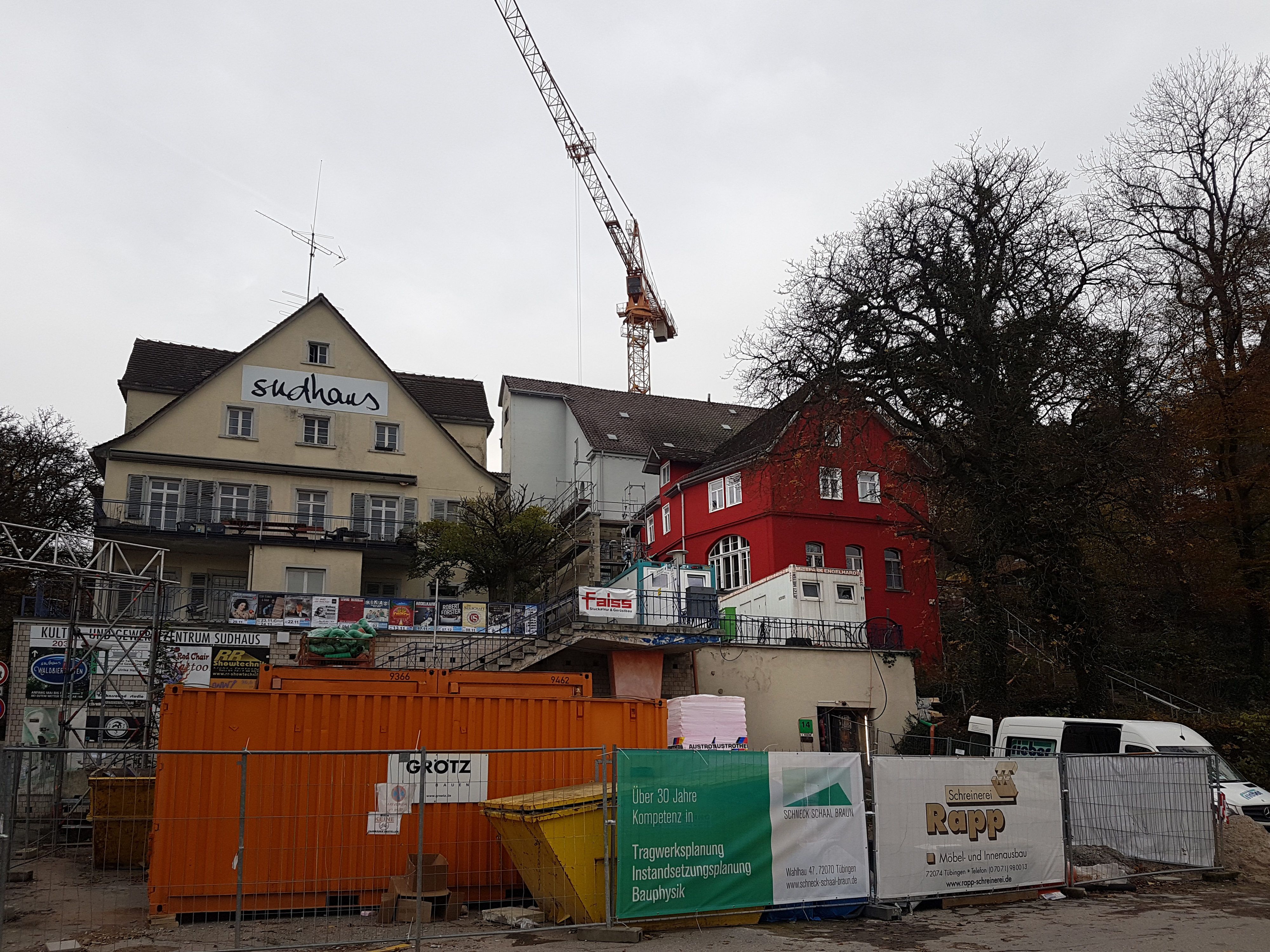 Das Sudhaus in Tübingen im Nov. 2019 in Umbauphase